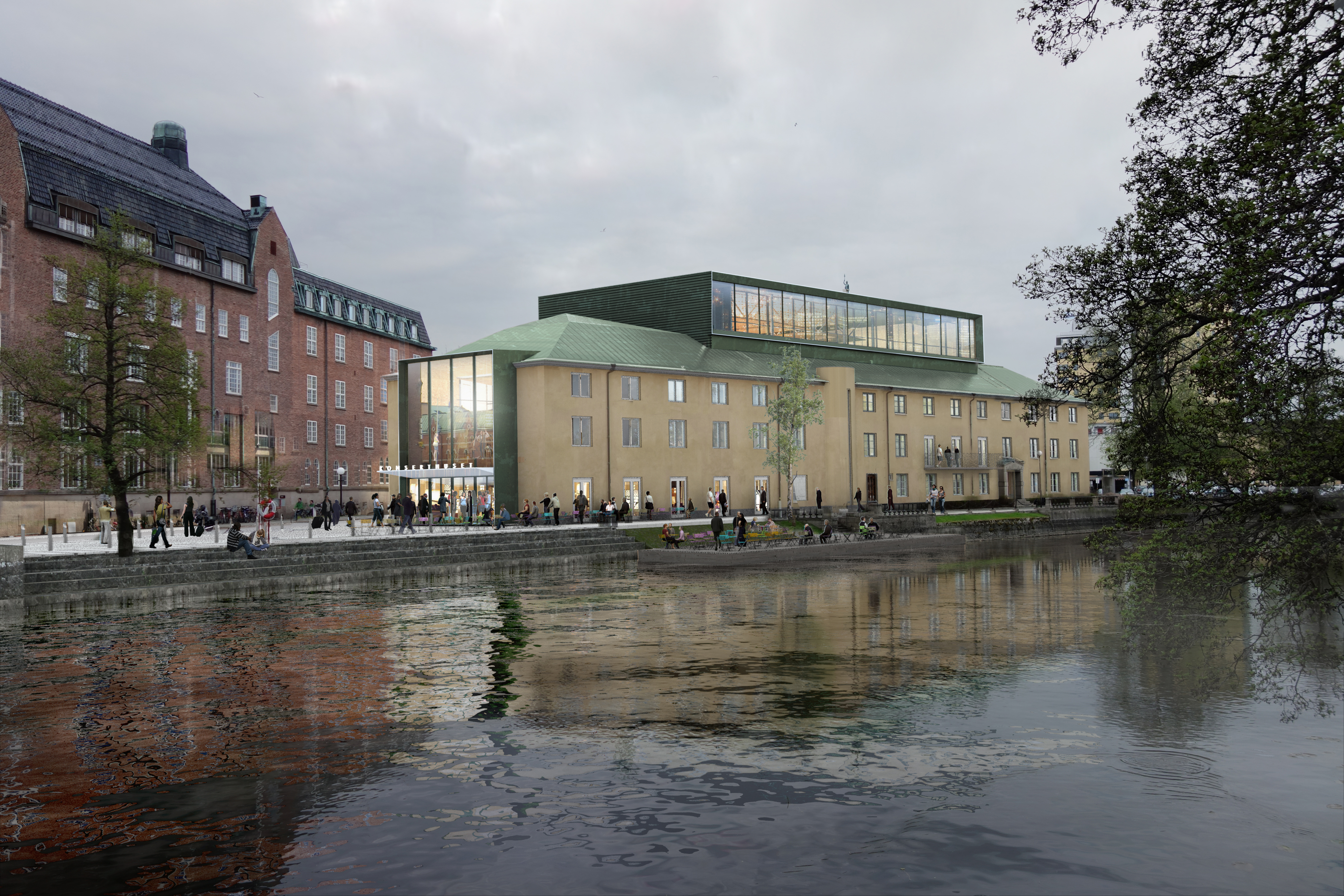 Örebro Konserthus 2015